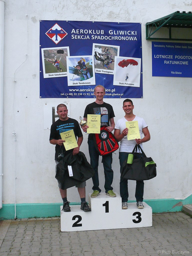 Spadochronowe Mistrzostwa Śląska 2013. Zwycięzcy w klasyfikacji indywidualnej (celność lądowania — spadochrony szybkie): I miejsce — Przemysław Zdziech (0,20 m), II miejsce — Wojciech Kielar (0,25 m), III miejsce — Tymoteusz Tabor 0,40 m — Sekcja Spadochronowa Aeroklubu Gliwickiego.